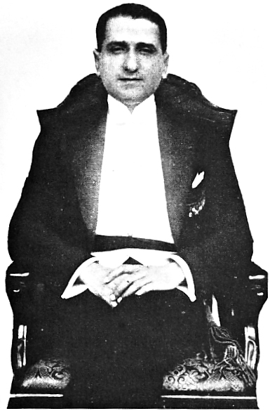 Alberto Salomón Osorio, diplomático y canciller peruano.